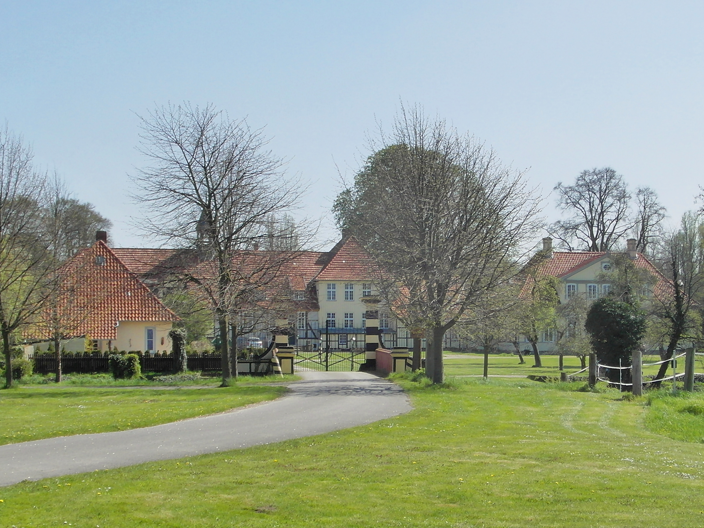 Der ehemalige Gutsbezirk Bettensen wurde 1929 Teil von Ihme-Roloven, einem heutigen Stadtteil von Ronnenberg in der Region Hannover. Das als Baudenkmal geschützte Gut gehört noch heute den Freiherren von Münchhausen. Die von Heinrich Grote erbaute Anlage besteht aus dem 1715 erbauten alten Herrenhaus, heute „Winterhaus“ genannt, und dem 1733 errichteten „Sommerhaus“, einer Scheune von 1750 und den übrigen Hofgebäuden vom Ende des 18. Jahrhunderts.